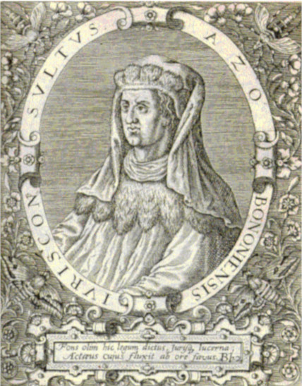 ritratto di Azzone Bolognese (Bologna, 1150 – 1225), giurista medioevale.